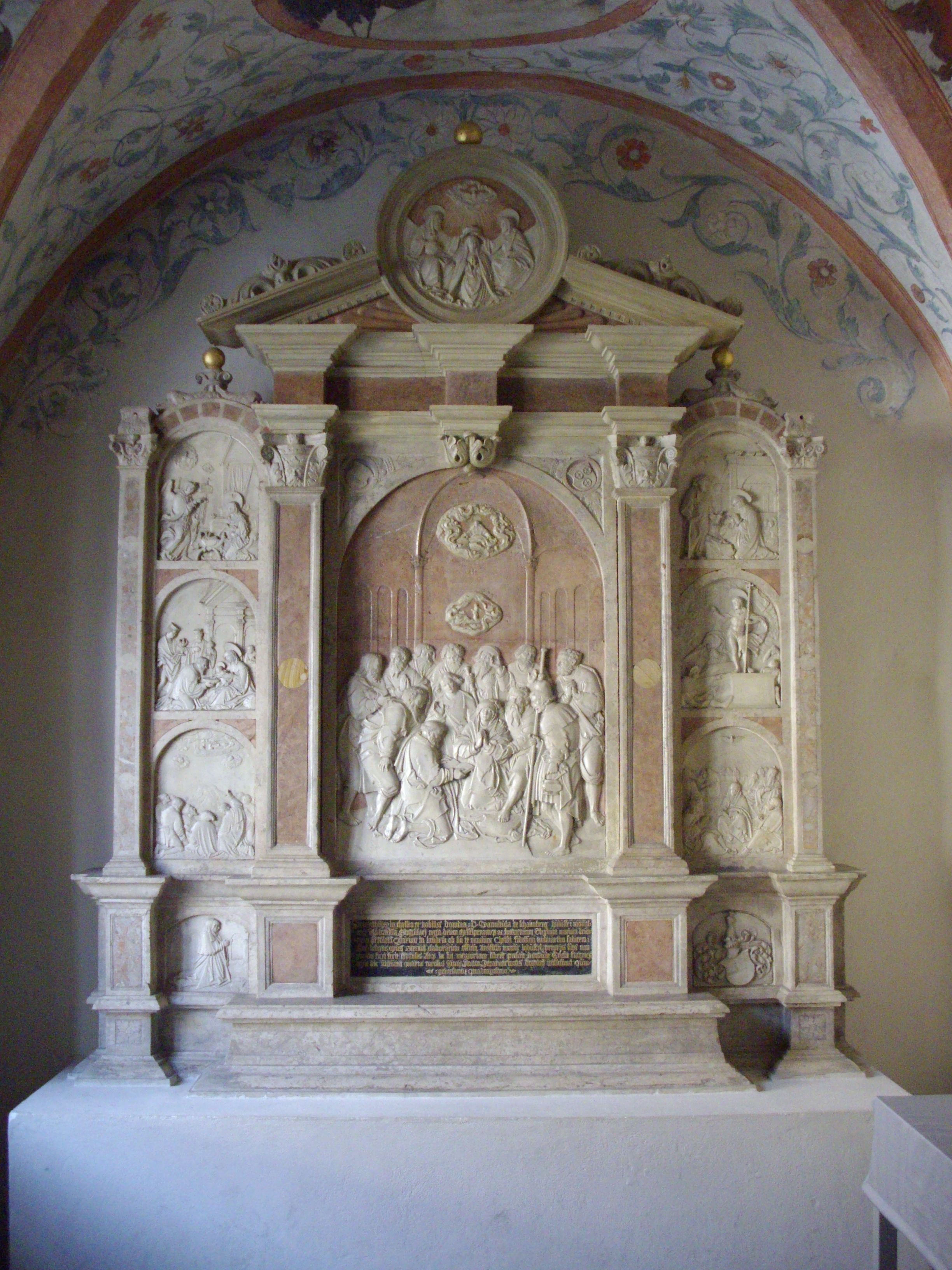 1534 - 1540 von Wandula von Schaumberg gestifteter Altar für das Kanonissenstift Obermünster in Regensburg